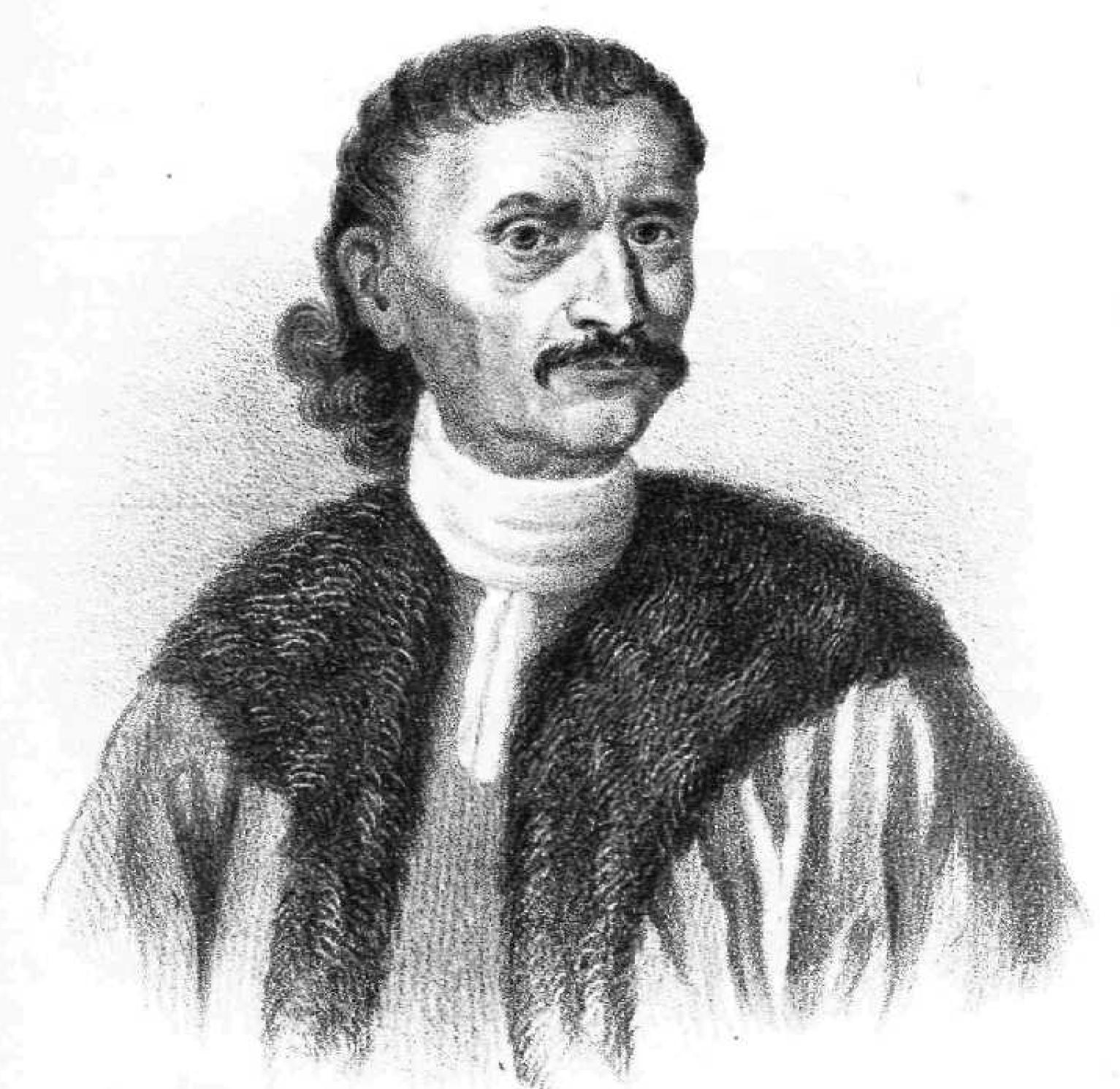 Griechischer Politiker, 19. Jahrhundert